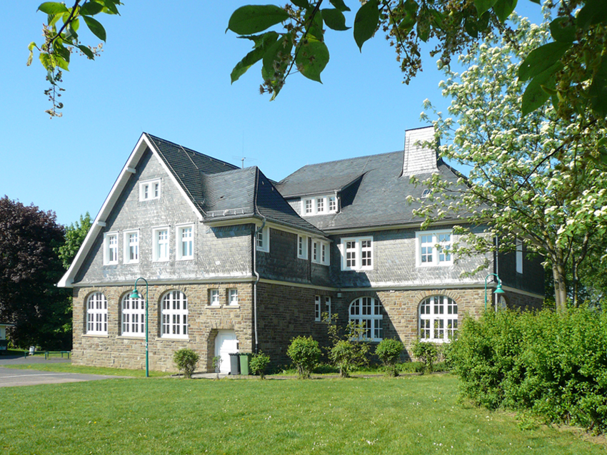 Alte Schule in Neunkirchen - Bücherei